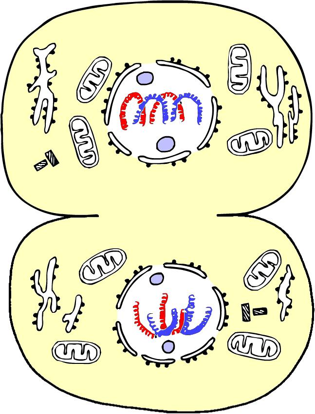 Télophase de la mitose cellulaire